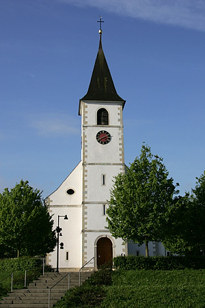 Katholische Kirche in Aesch, Kanton Basel-Landschaft